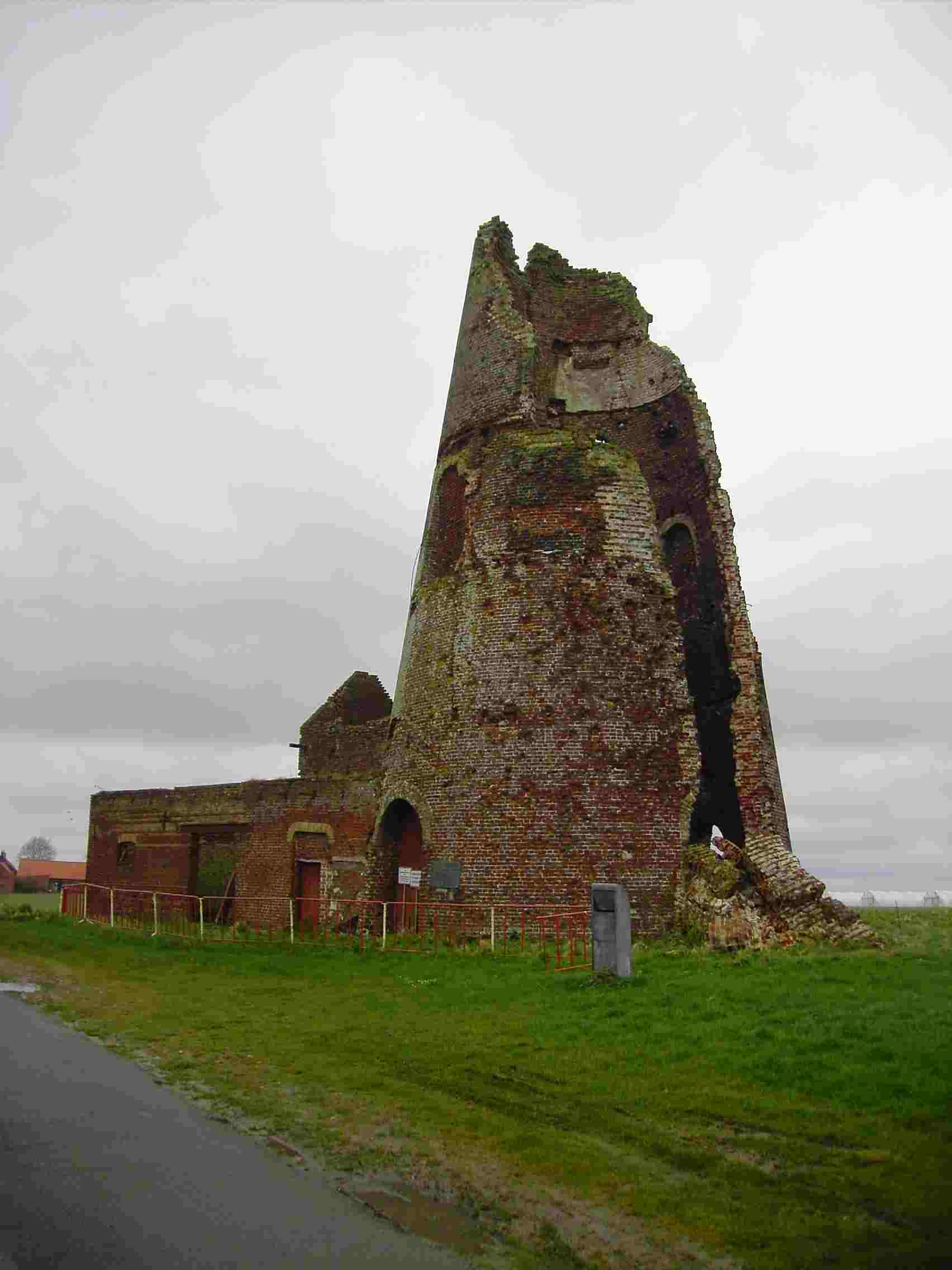 Klerken (gem. Houthulst): Vredesmolen